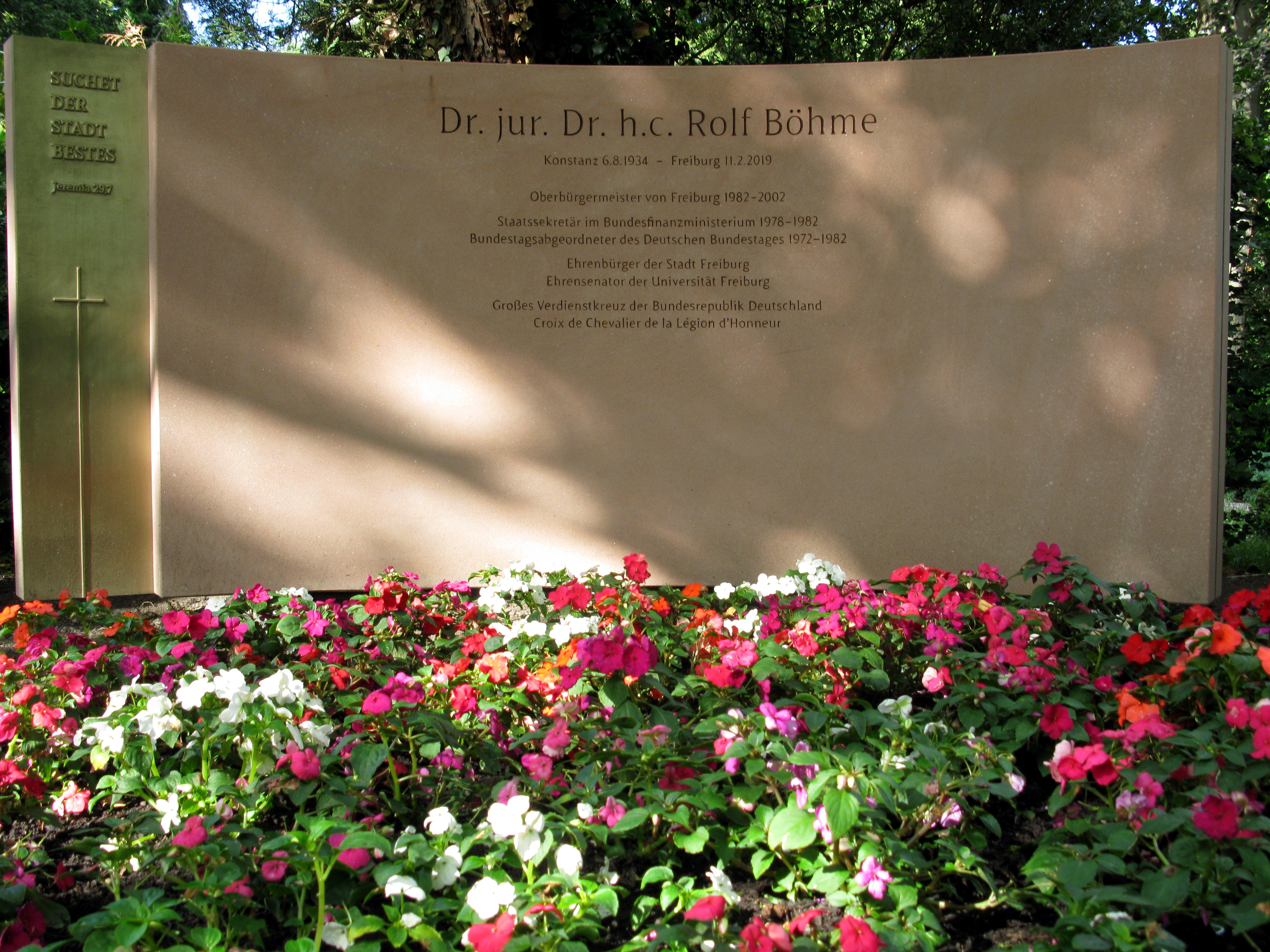 Rolf Böhme, Grab des Freiburger Oberbürgermeisters (1982-2002) auf dem Freiburger Hauptfriedhof